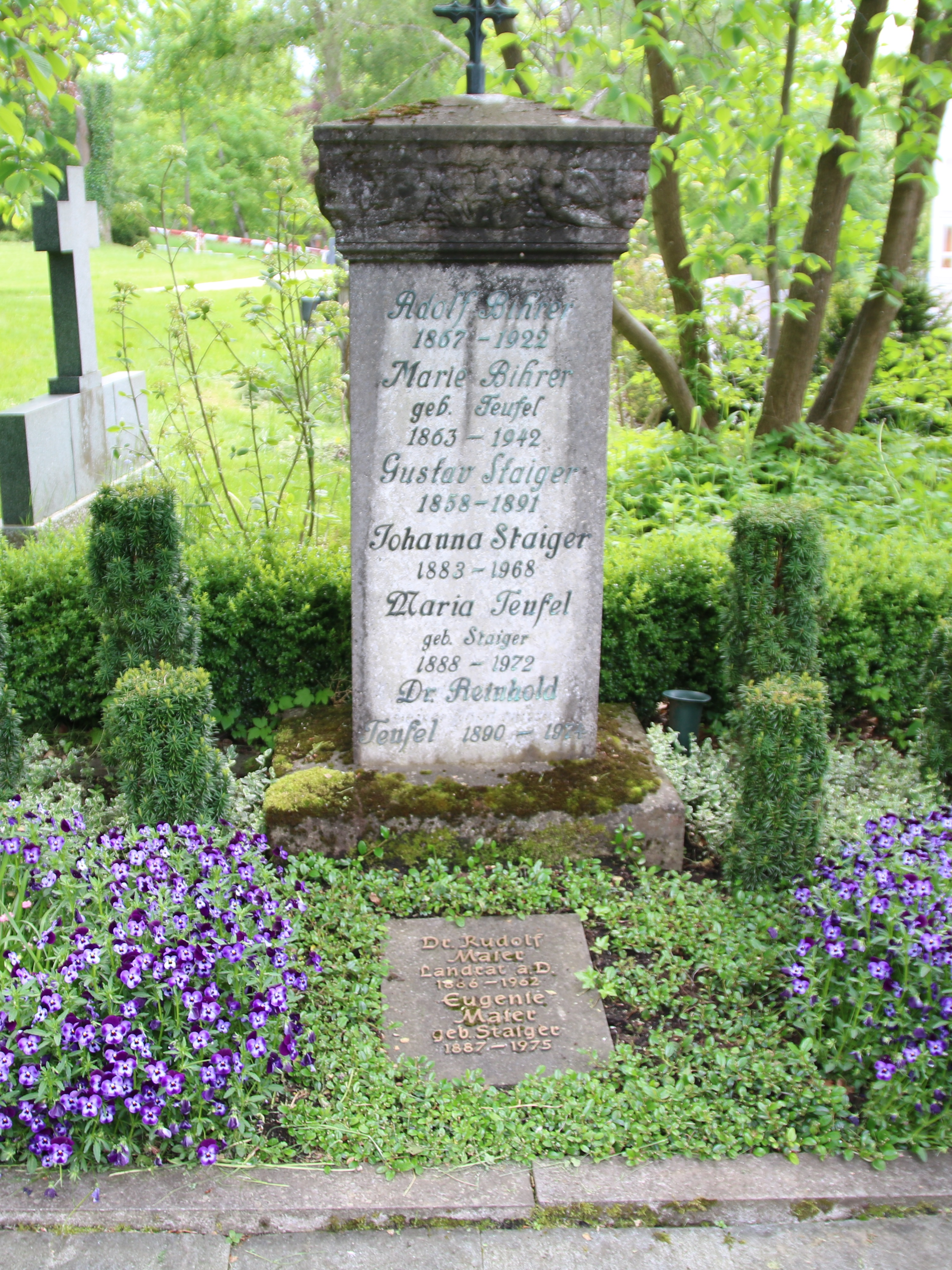 Bihrer-Grabmal in Tuttlingen mit Dr. Reinhold Teufel und Rudolf Maier (Landrat)